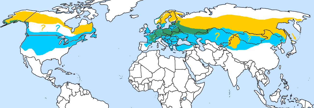 author is Ulrich Prokop Scops Main sources: Harris/Franklin: Shrikes and Bush Shrikes. Helm London 2000. p. 60 Panow: Die Würger der Paläarktis. Westarp Magdeburg 1996. p. 198